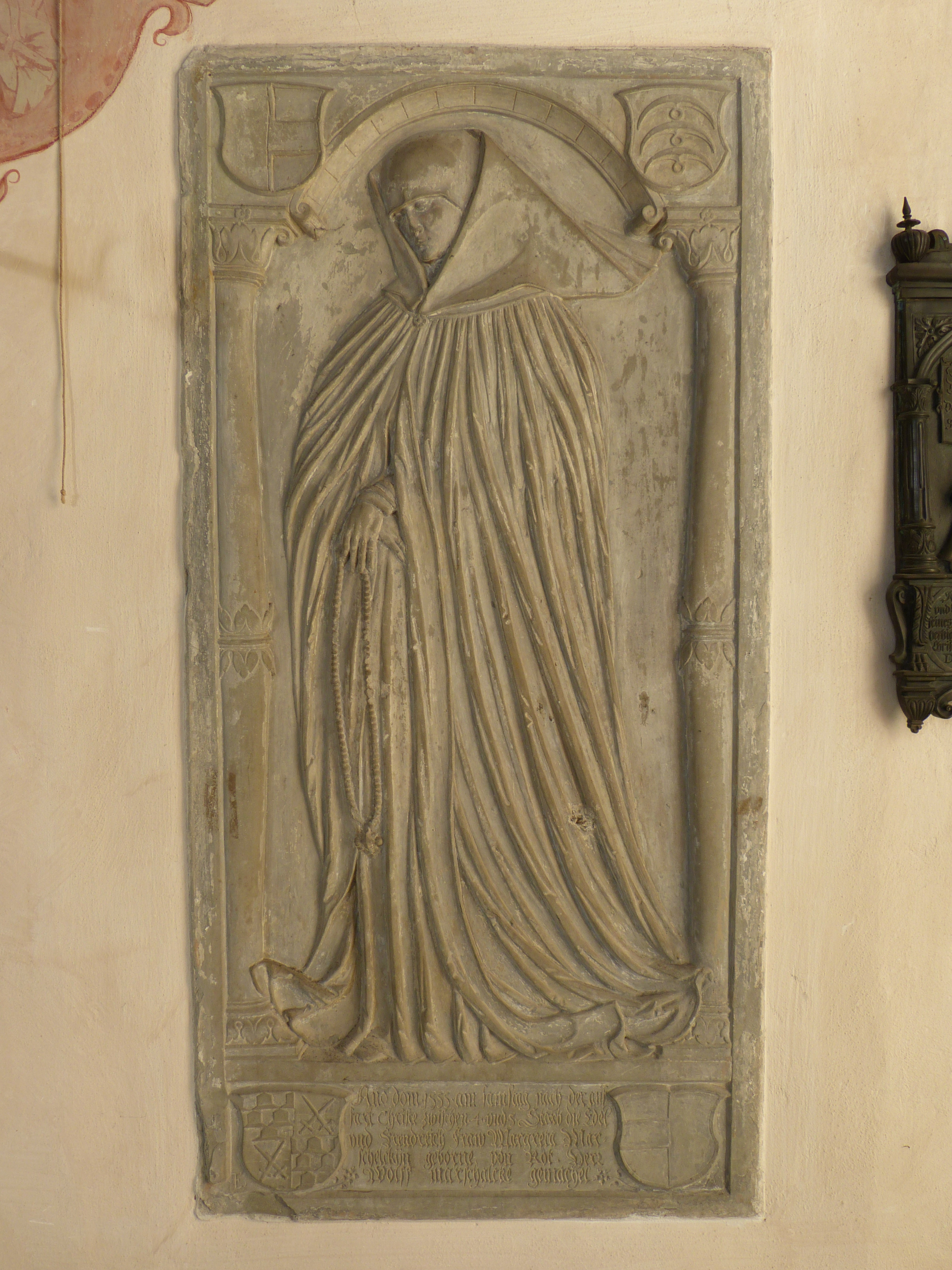 Epitaph der Margareta von Roth († 1555) in der Stiftskirche St. Philipp und Jakob in Bad Grönenbach, Landkreis Unterallgäu, Bayern